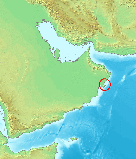 Masirah, Oman